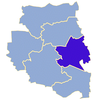 Powiat międzyrzecki, gmina Pszczew